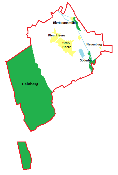 Lagekarte der Ortsteile innerhalb der Gemeinde Heere